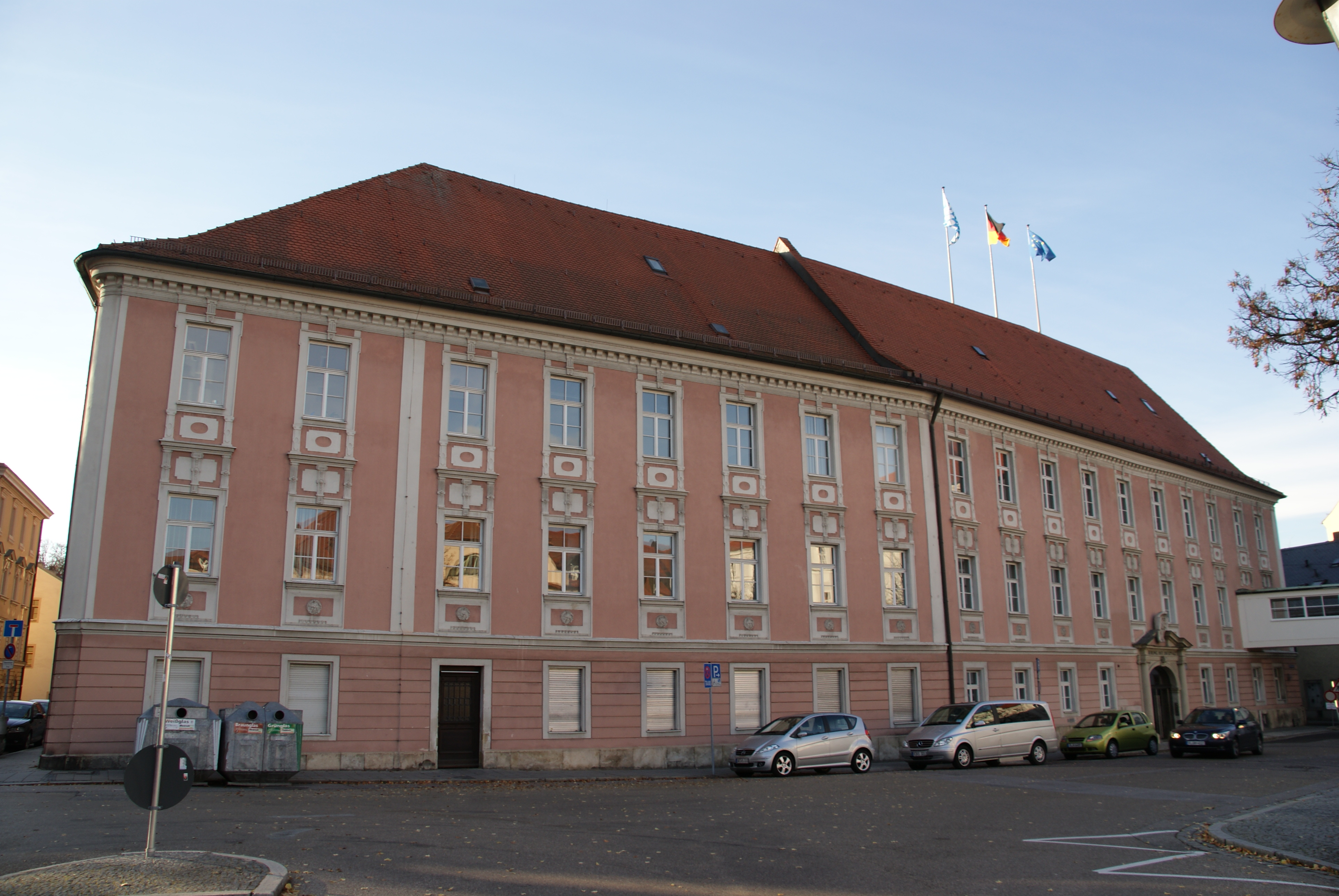 Ehemaliges "Äußeres Palais", spätes 17. Jahrhundert, 1792-1812 Resisdenz des Fürsten Anselm von Thurn und Taxis, heute Sitz der Regierung der Oberpfalz